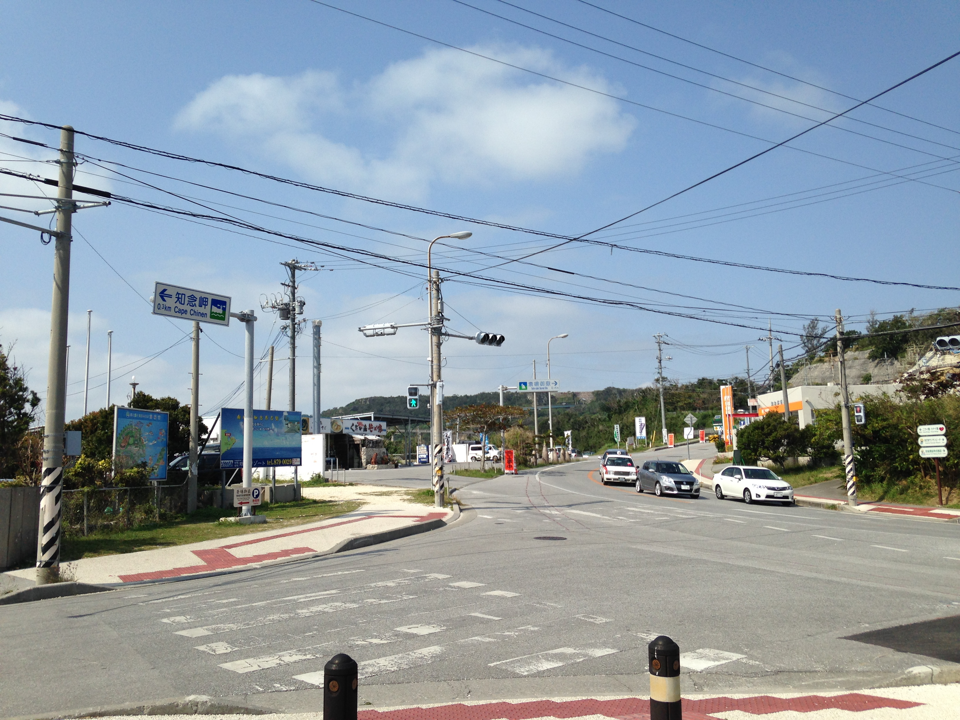 がんじゅうの駅・南城前の交差点